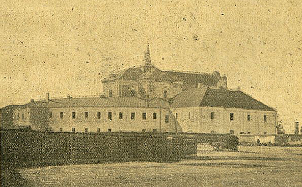 Photo, 1870